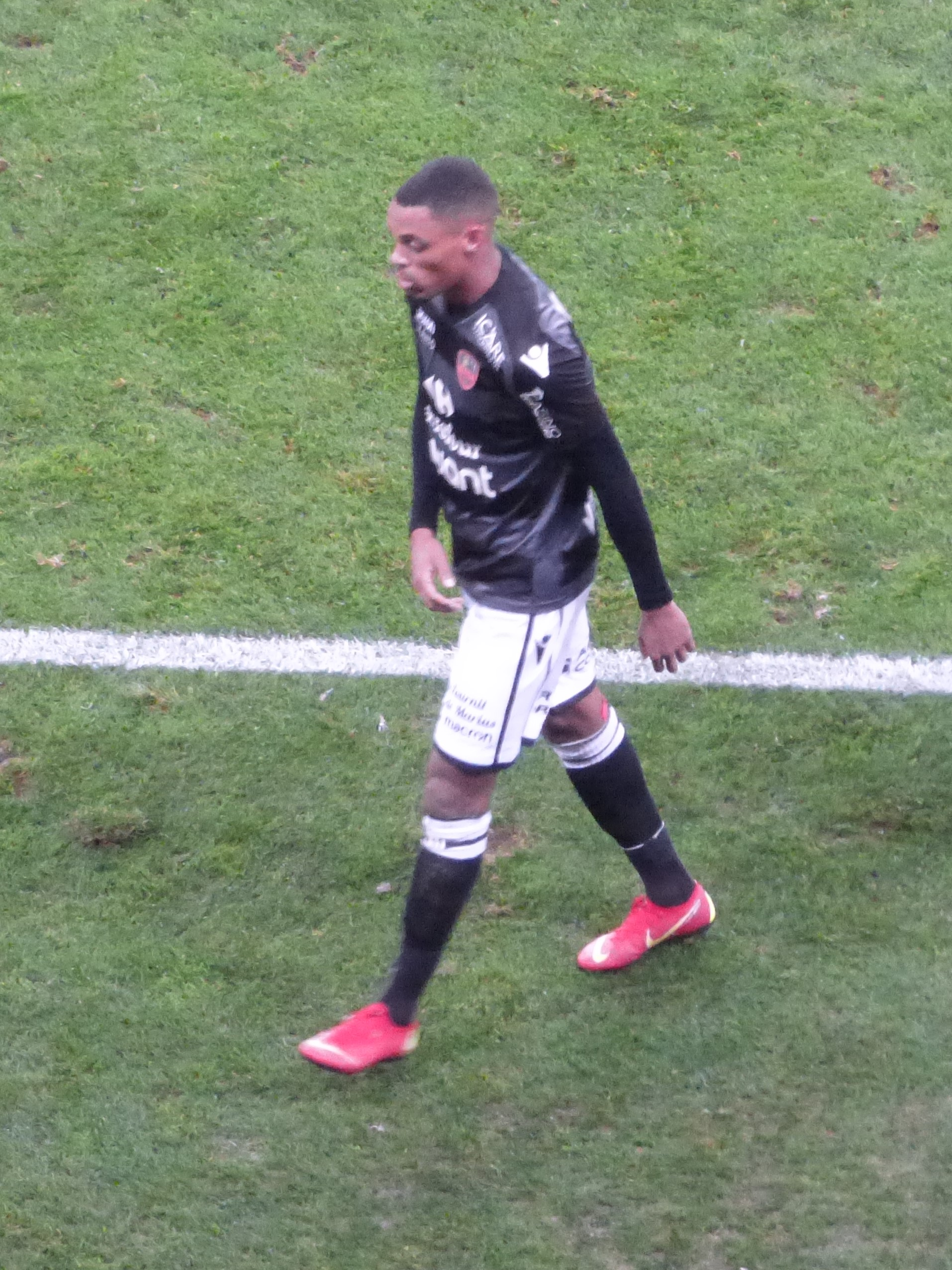 Wesley Jobello pendant le match RC Lens / GFC Ajaccio, comptant pour la onzième journée du championnat de France de Ligue 2 2018-2019 au Stade Bollaert-Delelis, le 22 octobre 2018.